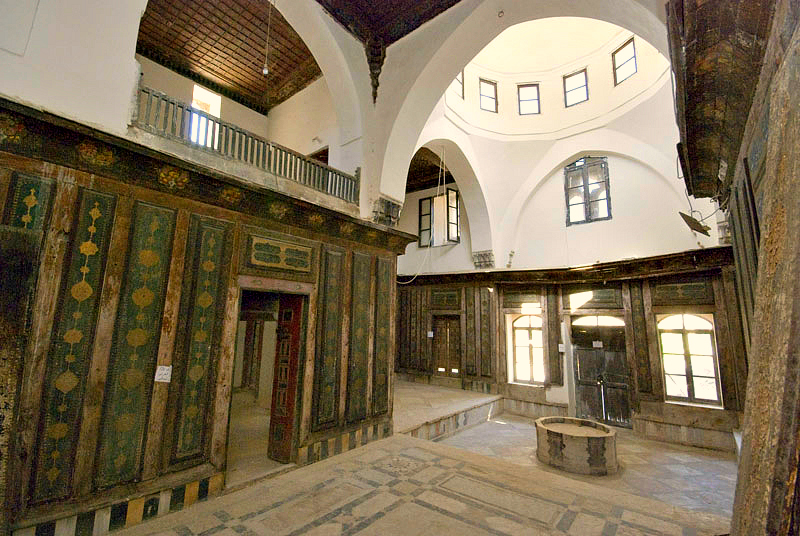 palazzo ghazaleh